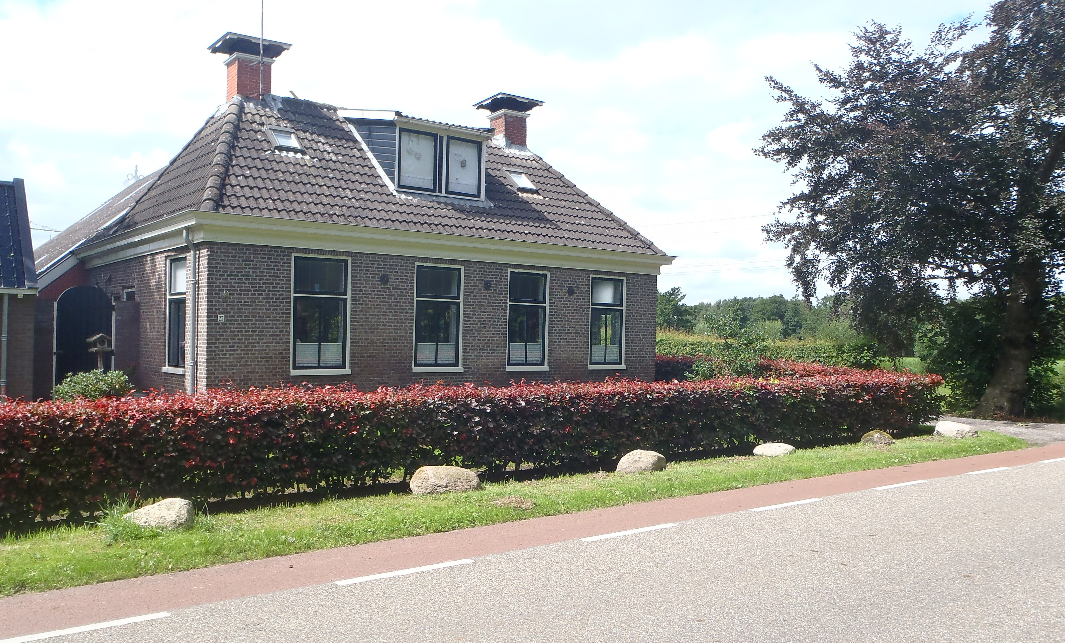 Klein- Auwema "de Pasop" anno 2016